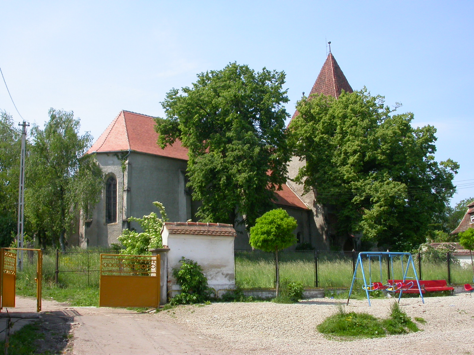 Ansamblul bisericii evanghelice fortificate, sf. sec. XIII- sec. XVIII